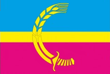 Прапор Сіверська